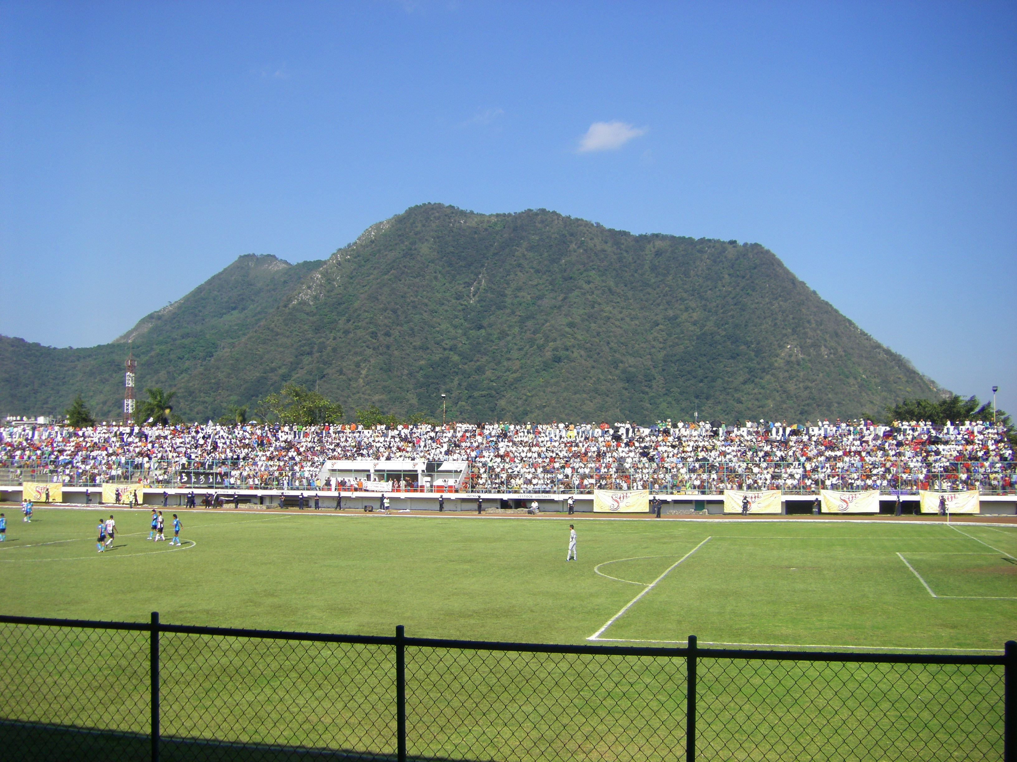 Gegentribüne Estadio Socum, Orizaba